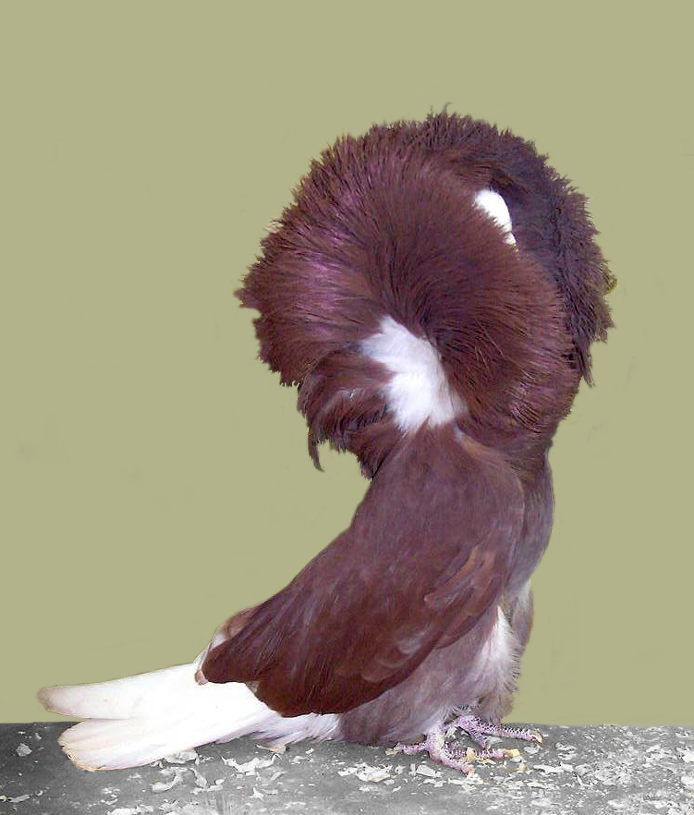 Jacobin Pigeon (Red)